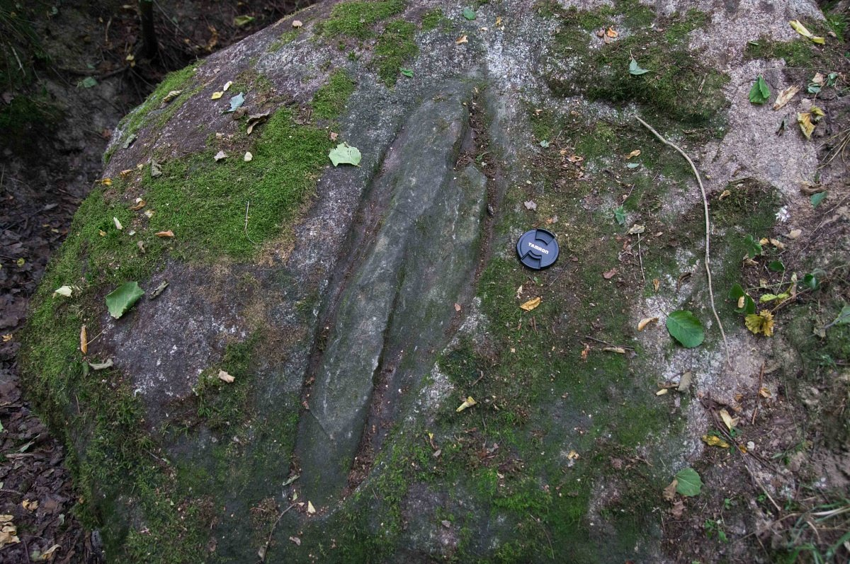 Багушэвічы. Багушэвіцкі камень з рыбкамі